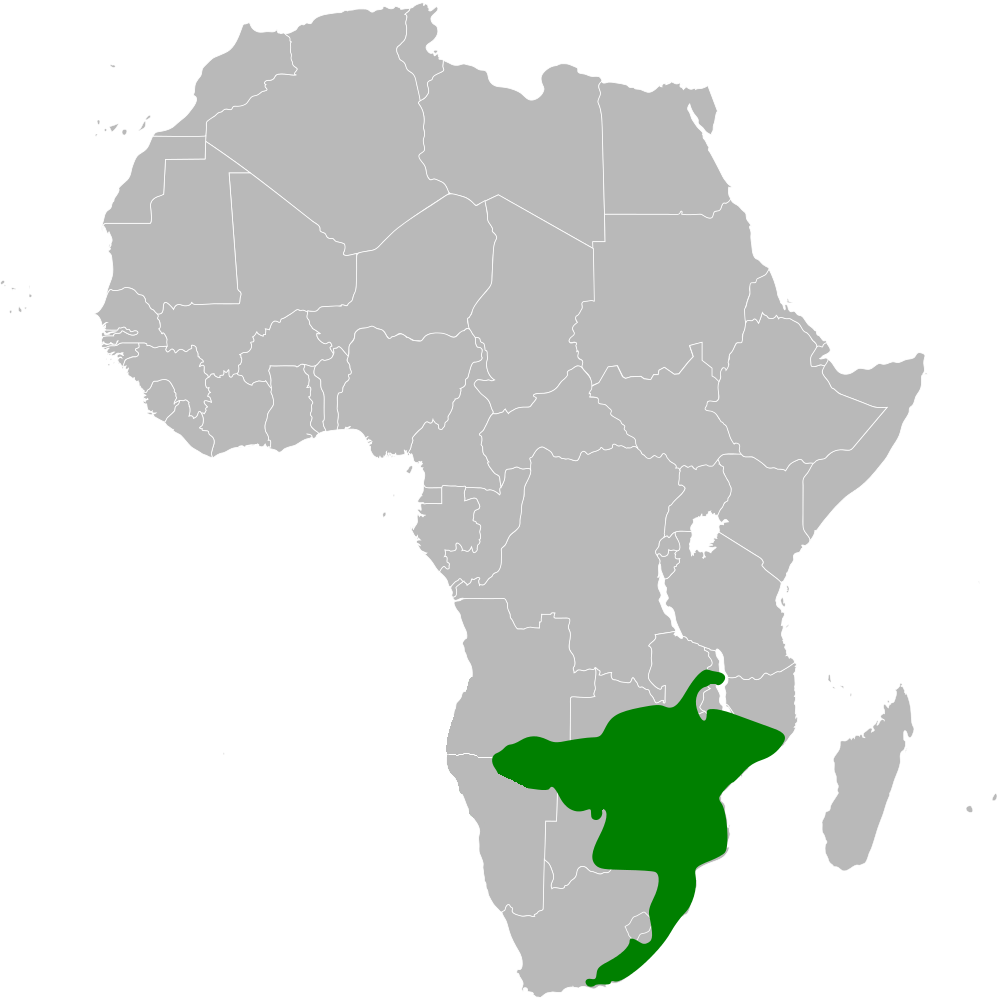 Parus niger distribution map